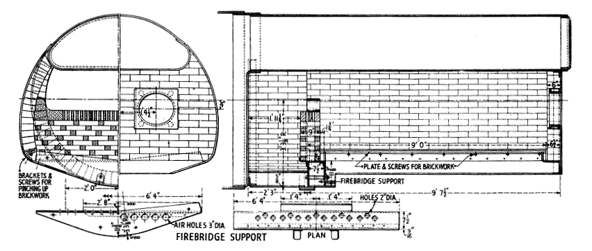 Zeichnung der Feuerbüchse der Paget-Lokomotive